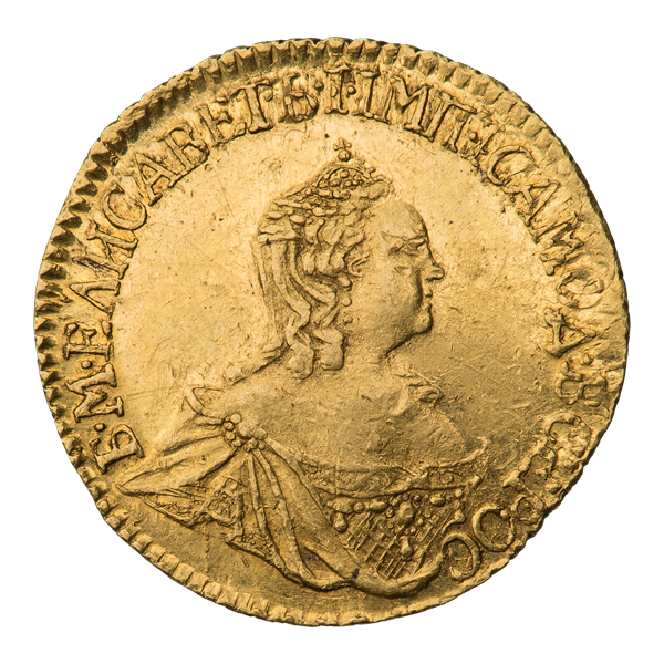 Рубль 1756 г. Императрица Елизавета Петровна. Новодел пробной монеты для дворцового обихода. Профильный портрет императрицы, вправо; на голове малая императорская корона. В волосах украшения из жемчуга и драгоценных камней. Бюст в расшитом и украшенном драгоценными камнями платье. На правом плече скреплена застёжкой спадающая мантия. Круговая надпись: Б∙М∙ЕЛИСАВЕТЪ∙I∙IМП:IСАМОД:ВСЕРОС∙. Узд. 4075Н ; Биткин Н566 (R3); Дьяков 1.1.386 (R3); Sev. 203 . Аверс